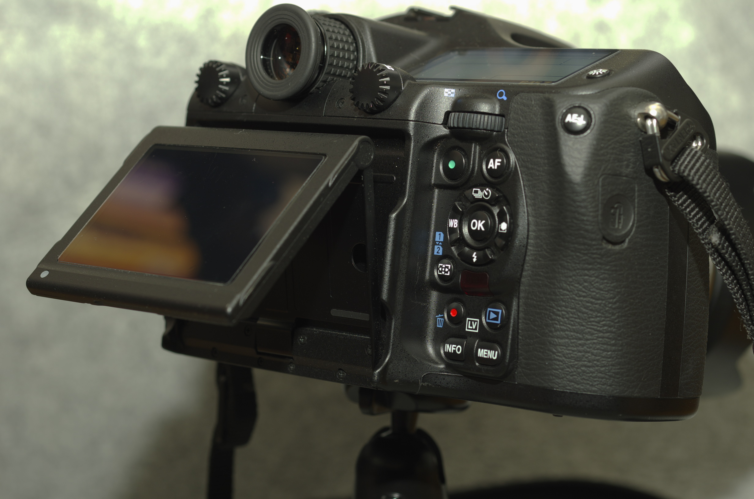 ペンタックス 645Z チルト液晶